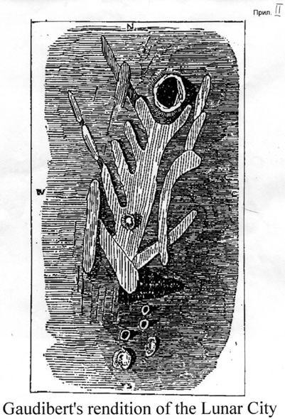 Город Груйтуйзена по рисунку М. Гудиберта